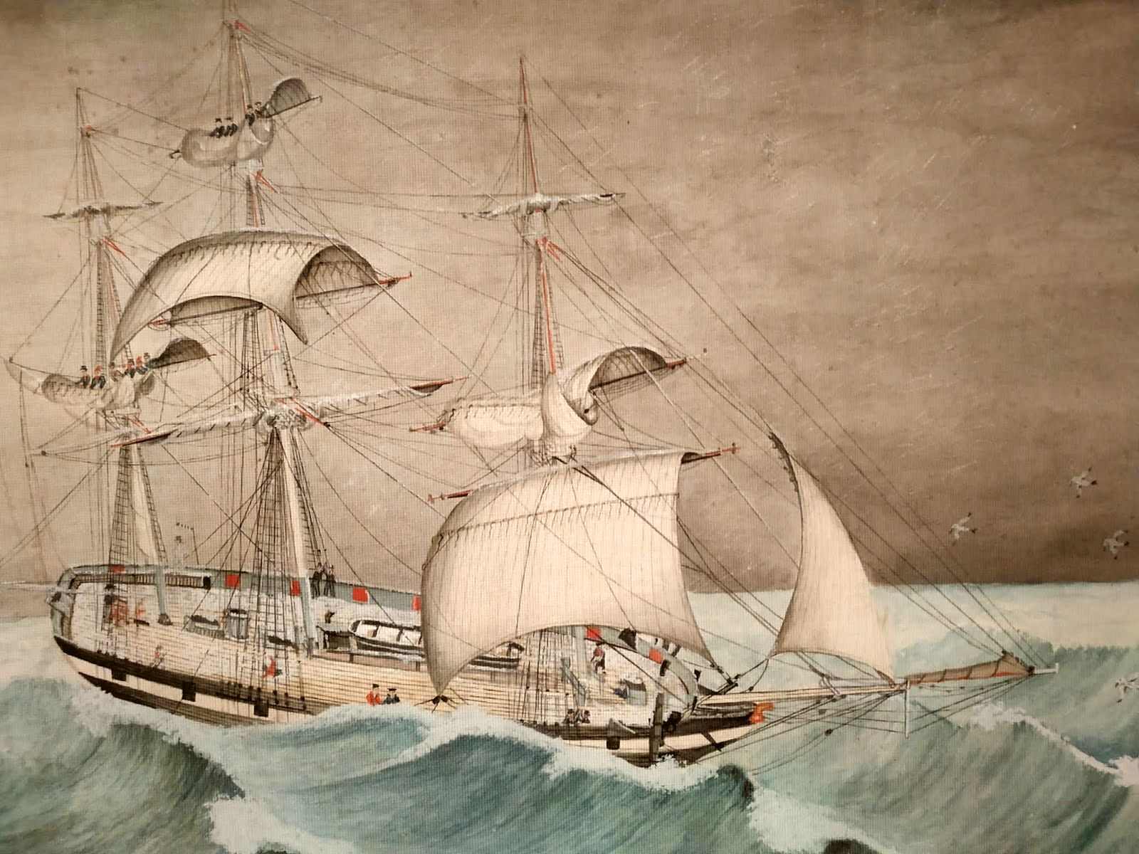 aquarelle